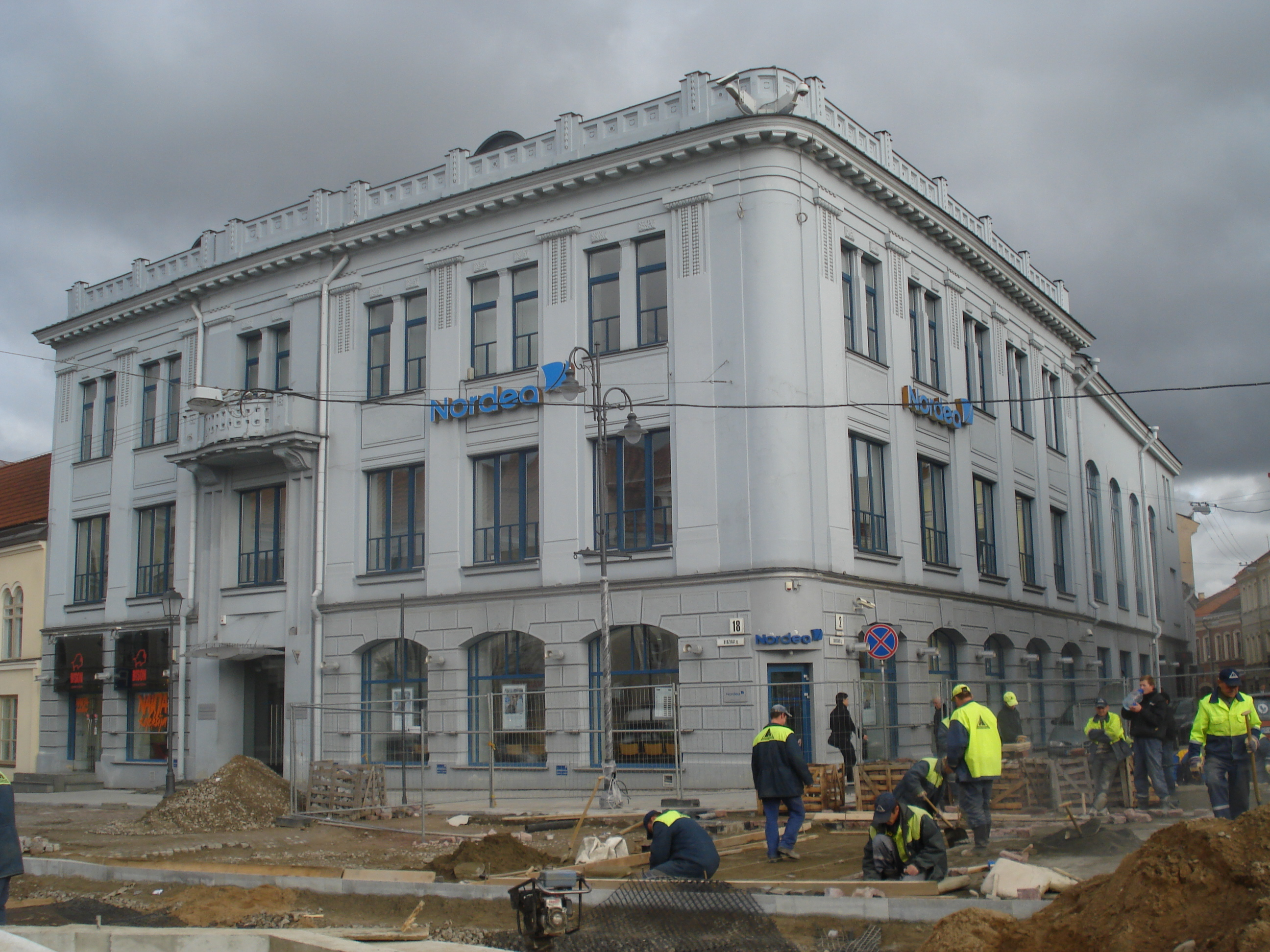 Nordea Lietuva in Vilnius. Didžioji g. 18 / Savičiaus g. 2